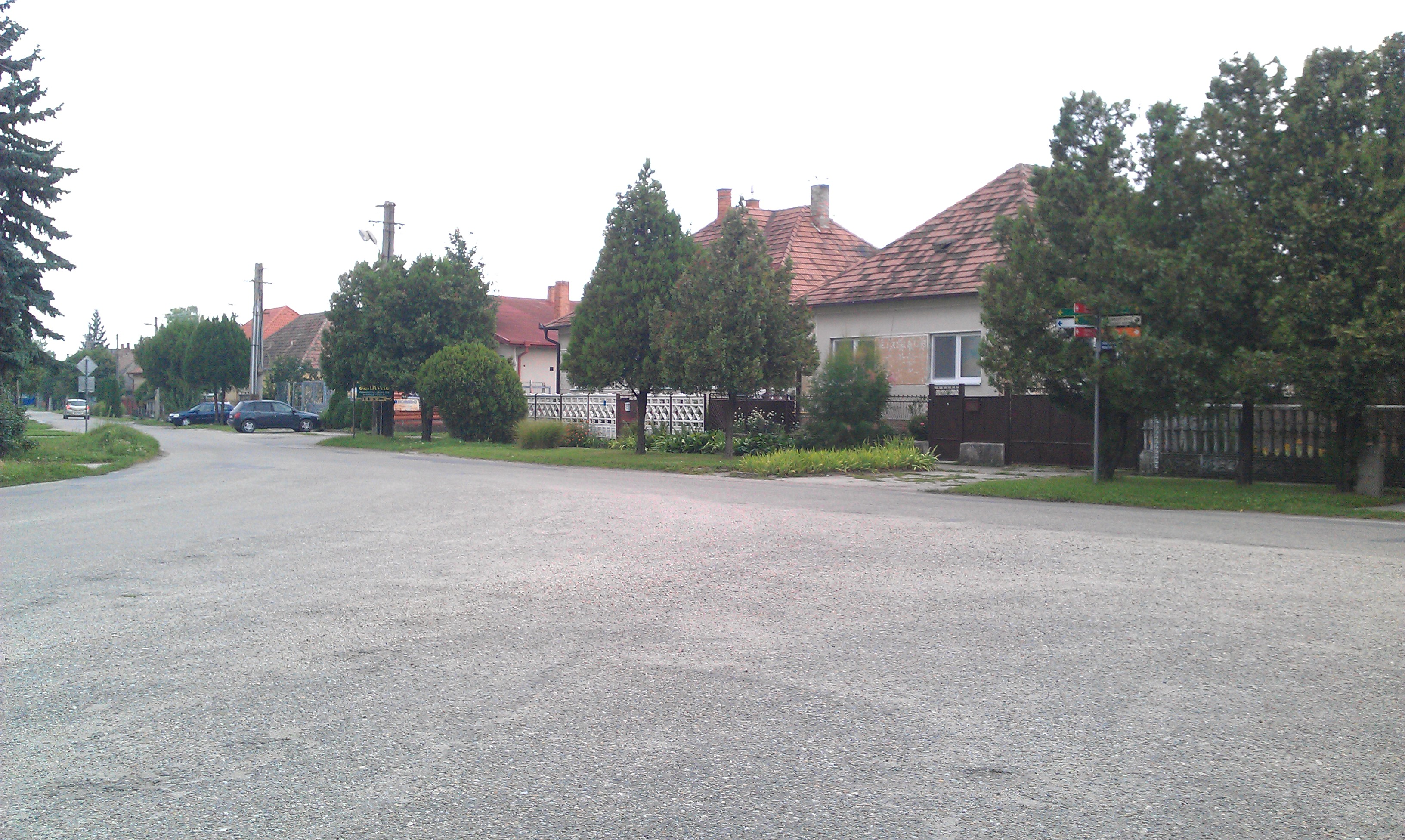 930 12 Ohrady, Slovakia